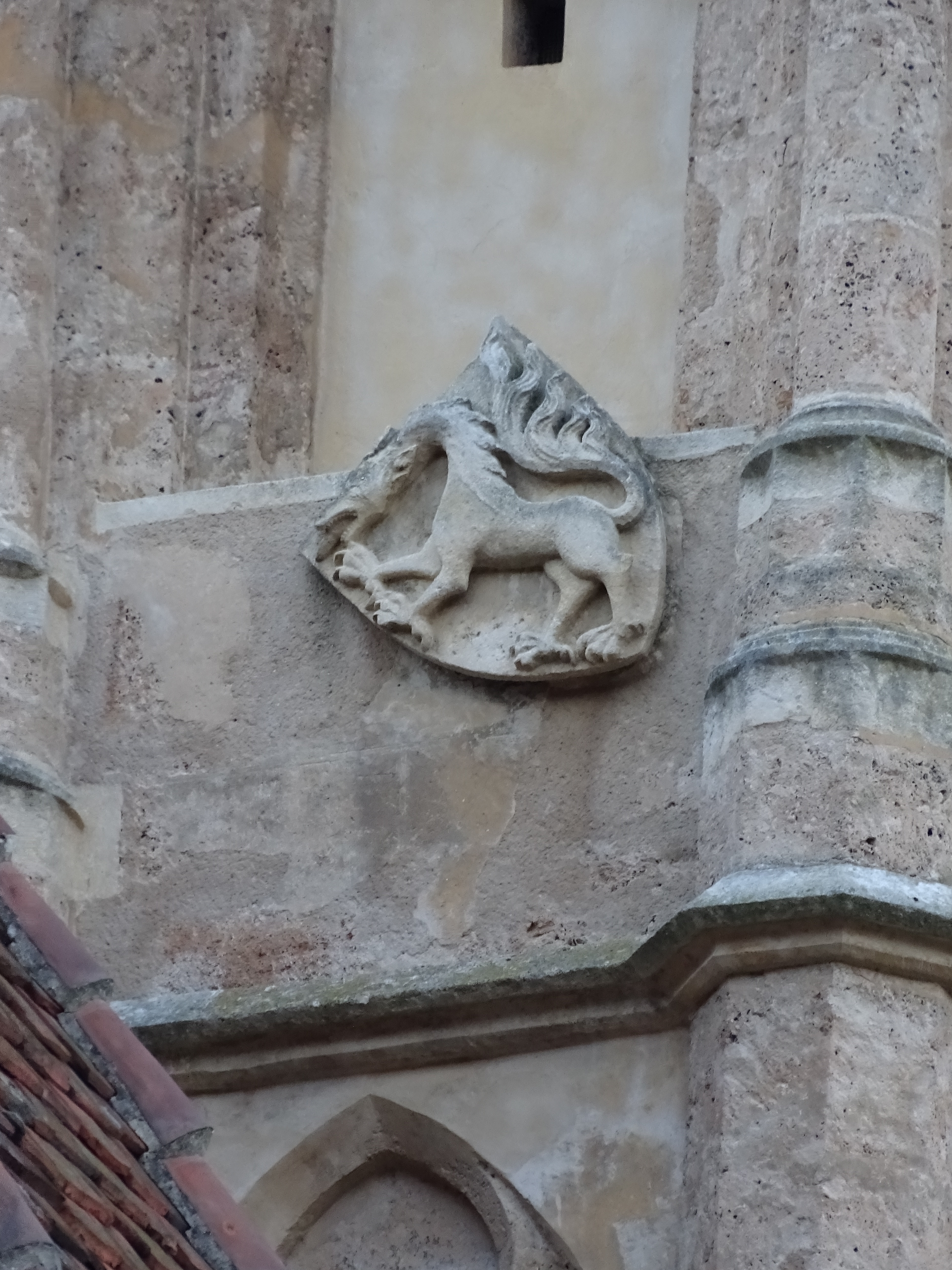 Ein Wappen mit dem steirischen Panther am Turm der Wallfahrtskirche Maria Straßengel